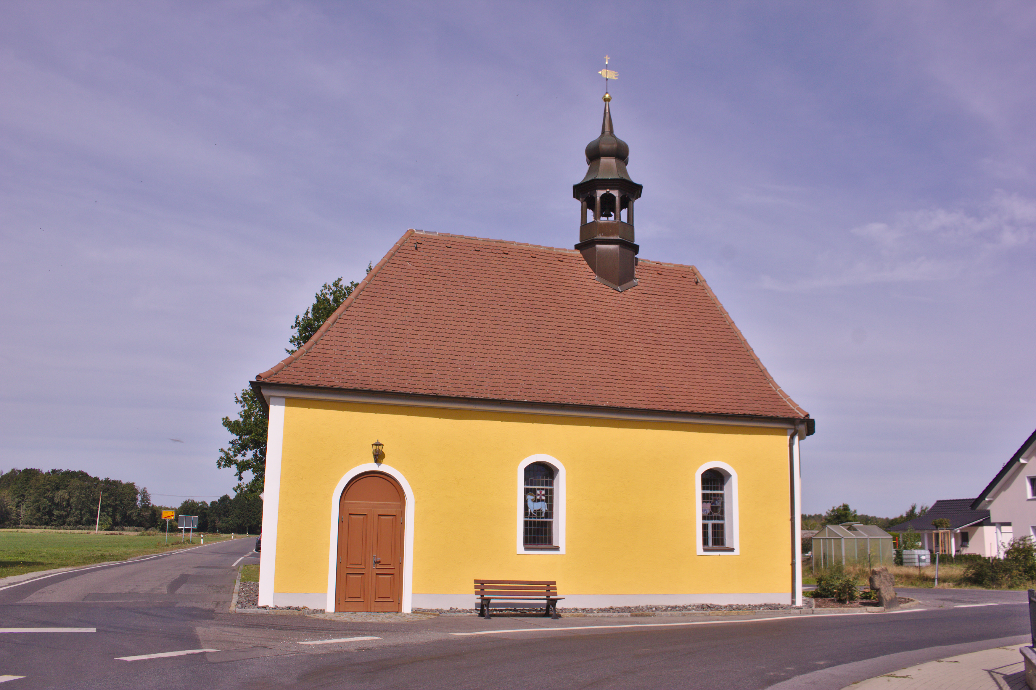 Hornjoserbsce: Kapałka w Sulšecach